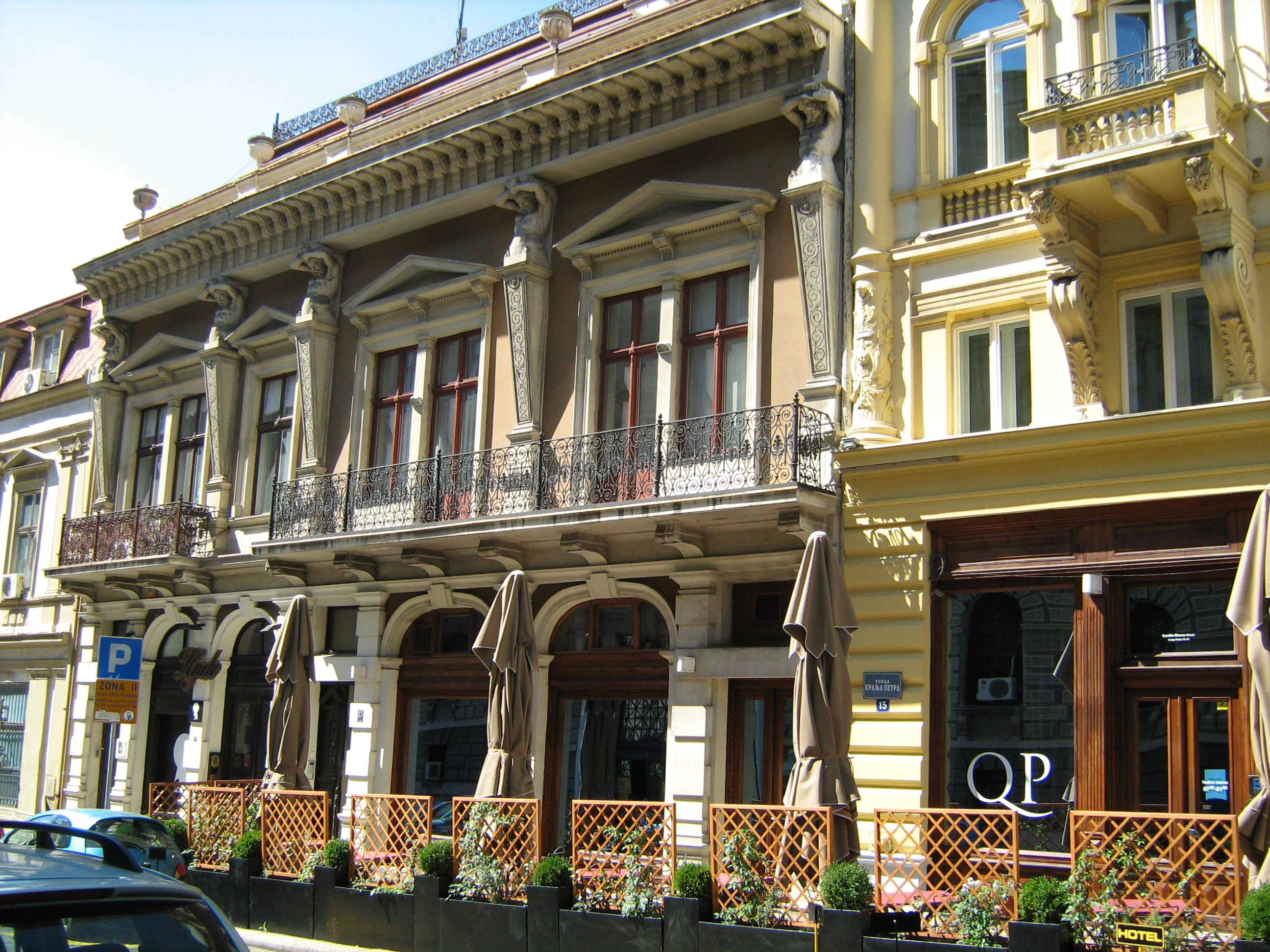 Кућа Милорада Павловића, краља Петра 11-13, Београд и Кућа трговца Црвенчанина, краља Петра 15, Београд